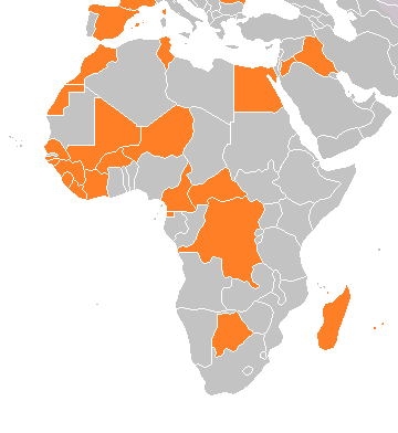 Burkina Faso & Sierra Leone